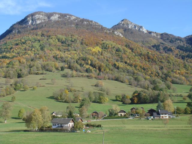 Pointe de la Galoppaz et le mont Céty au-dessu de Puygros.